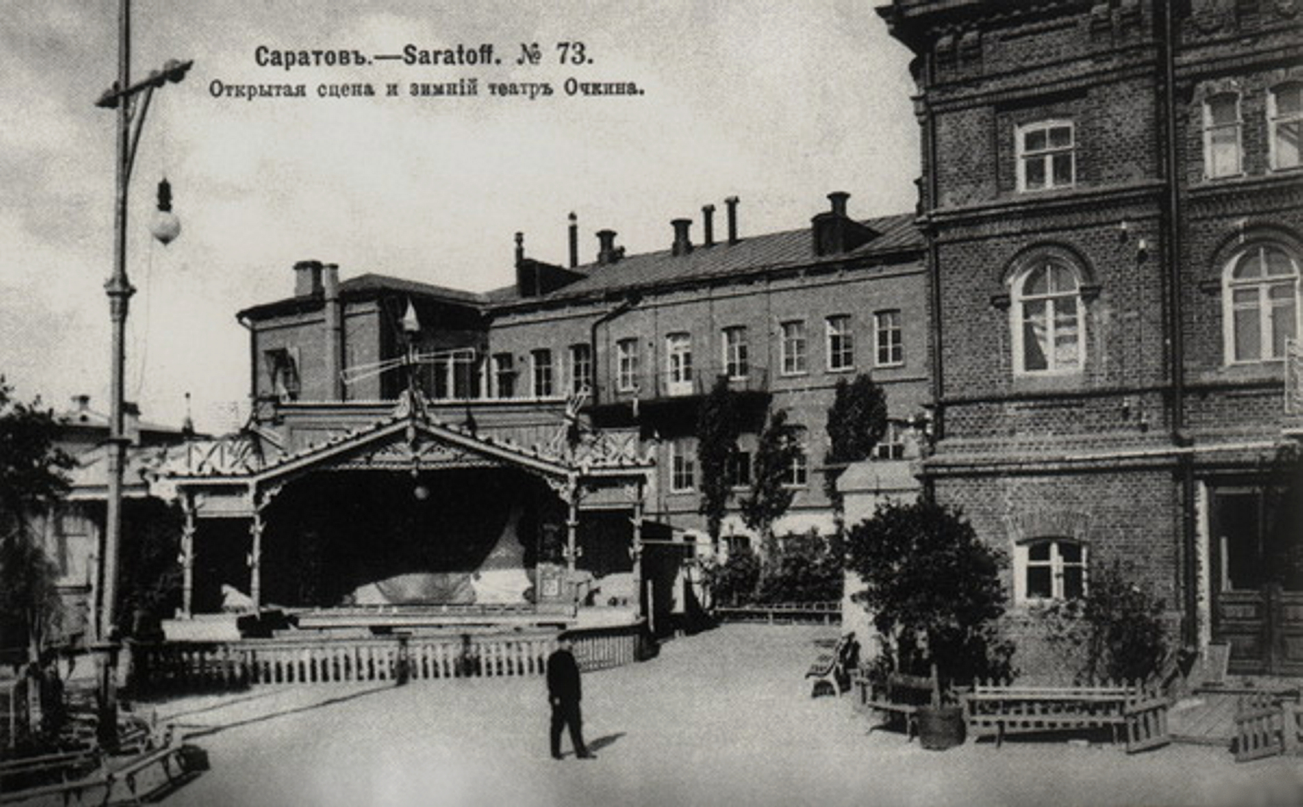 копия открытки "Саратов. Открытая сцена и зимний театр Очкина"